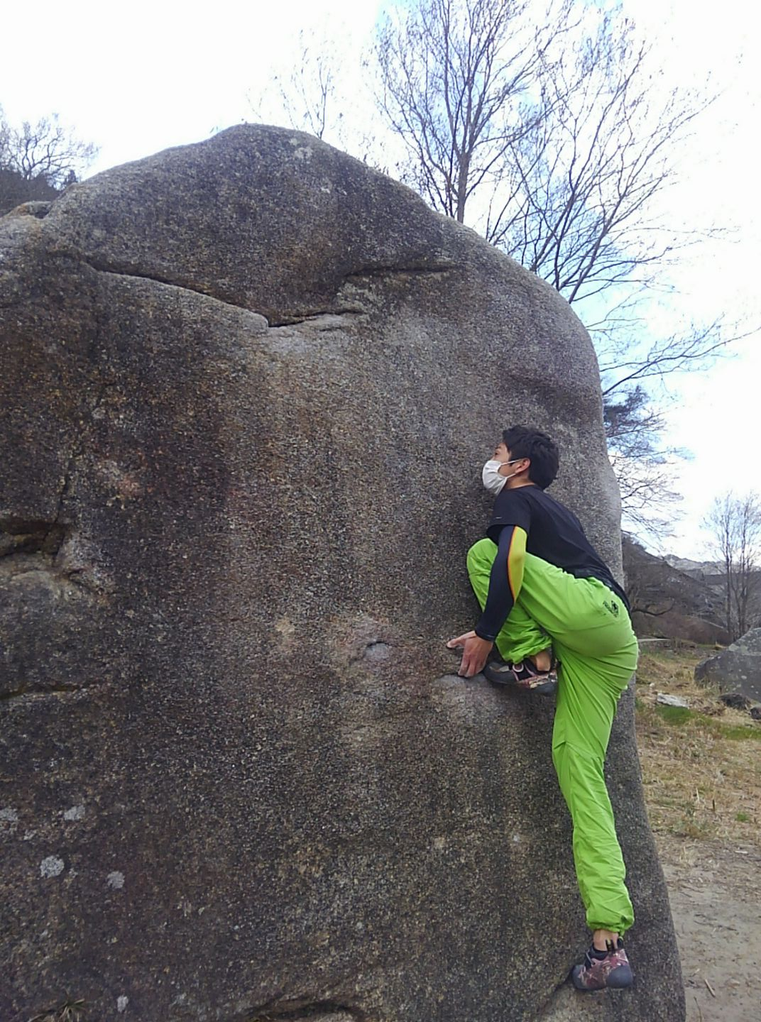 京都府笠置町木津川沿いにある岩にのぼっている写真